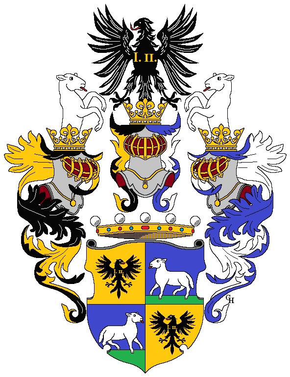 Wappen des Textilunternehmers und Pioniers der Brünner Textilindustrie Wilhelm Mundy (1742–1805), verliehen anlässlich seiner Erhebung in den erbländisch-österreichischen Freiherrenstand 1789. Beachtenswert sind die Herrscherinitialen I(osephus) II. Zeichnung von Gerd Hruška ( Für weitere Informationen zu dieser Standeserhebung siehe (